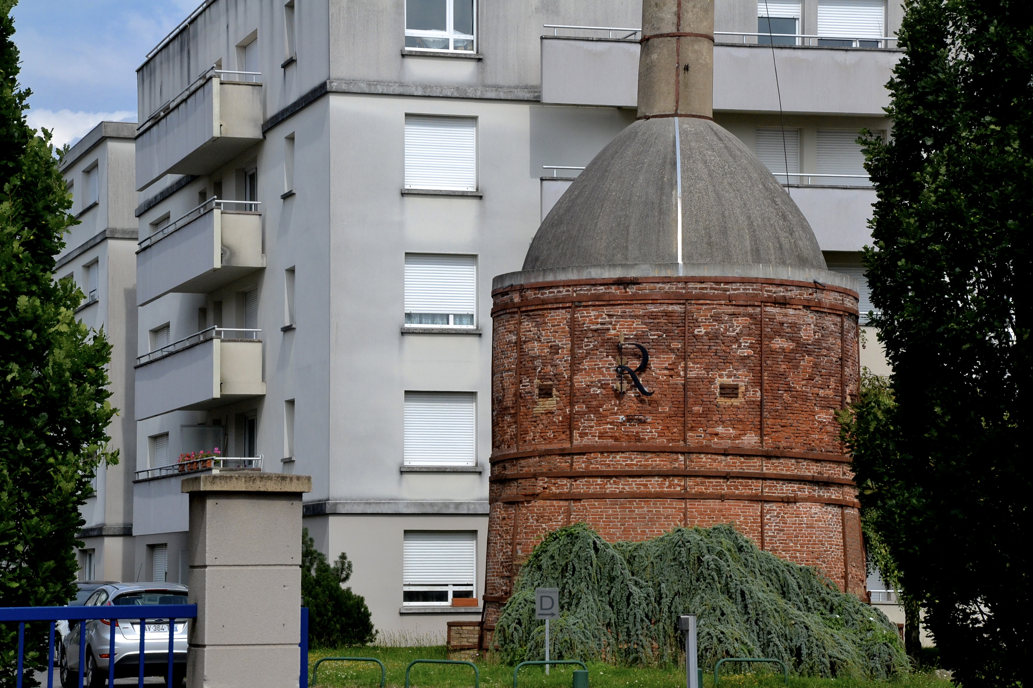 Ancien four à porcelaine de l'usine Raynaud de Limoges (Haute-Vienne, France).